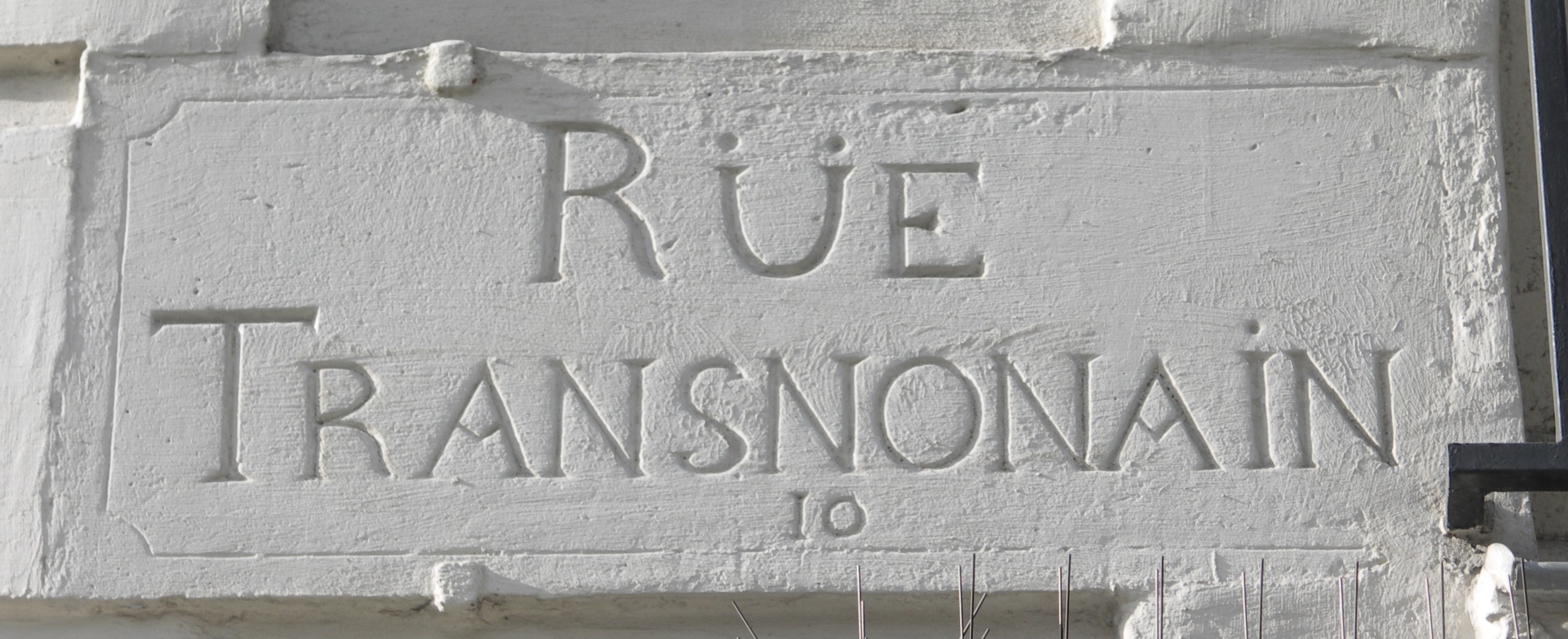 Plaque de nom de rue de Paris conforme à l'ordonnance de 1730. La rue Transnonain (ou Transnonnain) était une partie de l'actuelle rue Beaubourg, 75003.